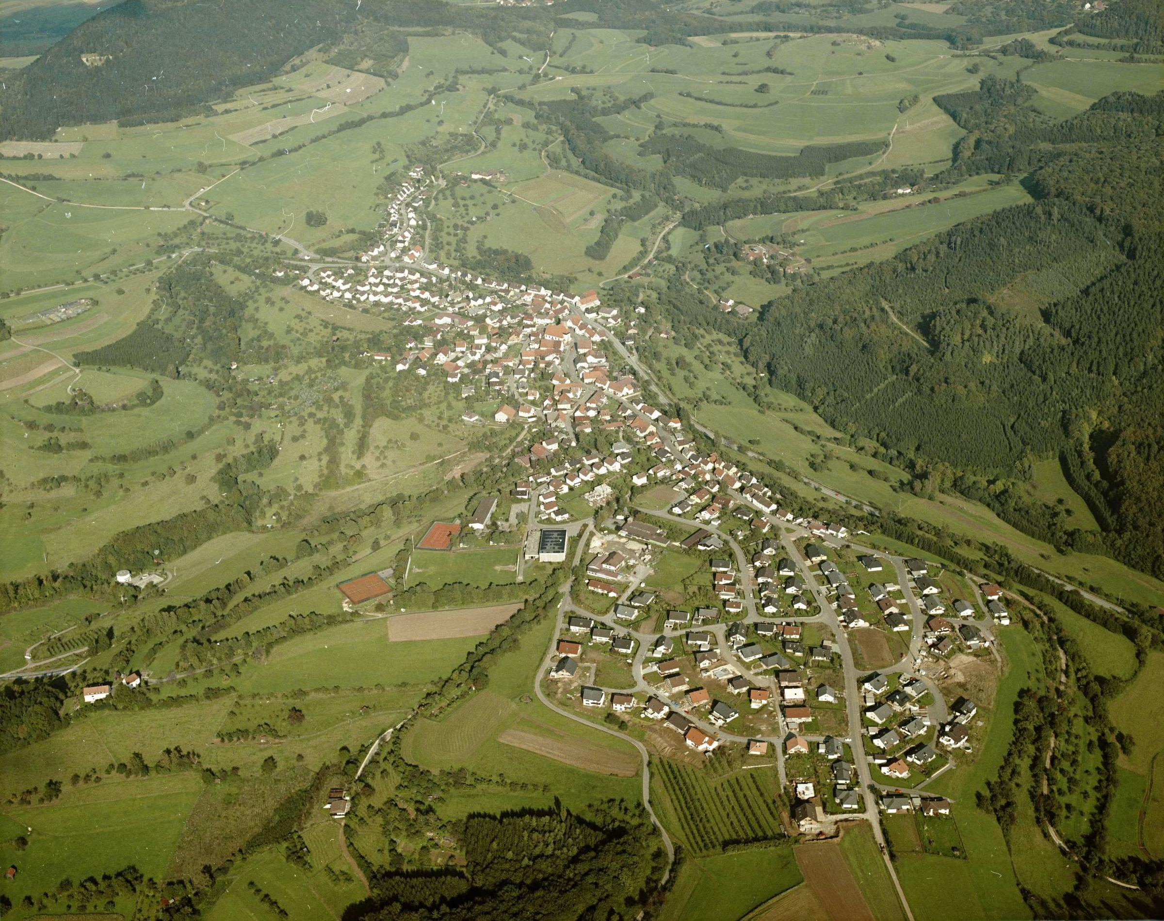 Luftbild von Wißgoldingen - Staatsarchiv Sigmaringen - Archivalieneinheit N 1/96 T 1 Nr. 585